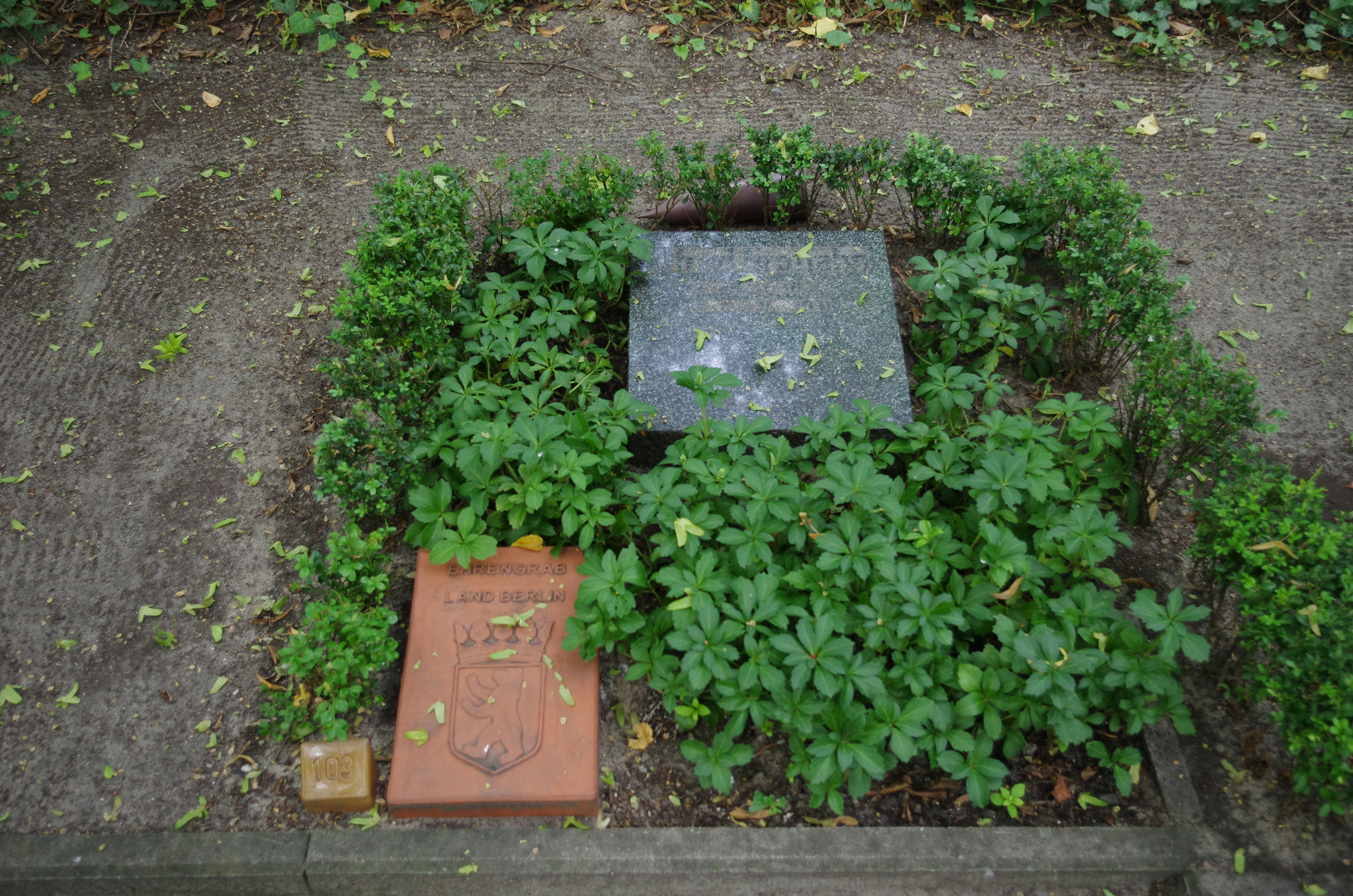 Baumschulenweg in Berlin. Der Friedhof steht unter Denkmalschutz. Hier das Ehrengrab von Alfred Grotjahn.